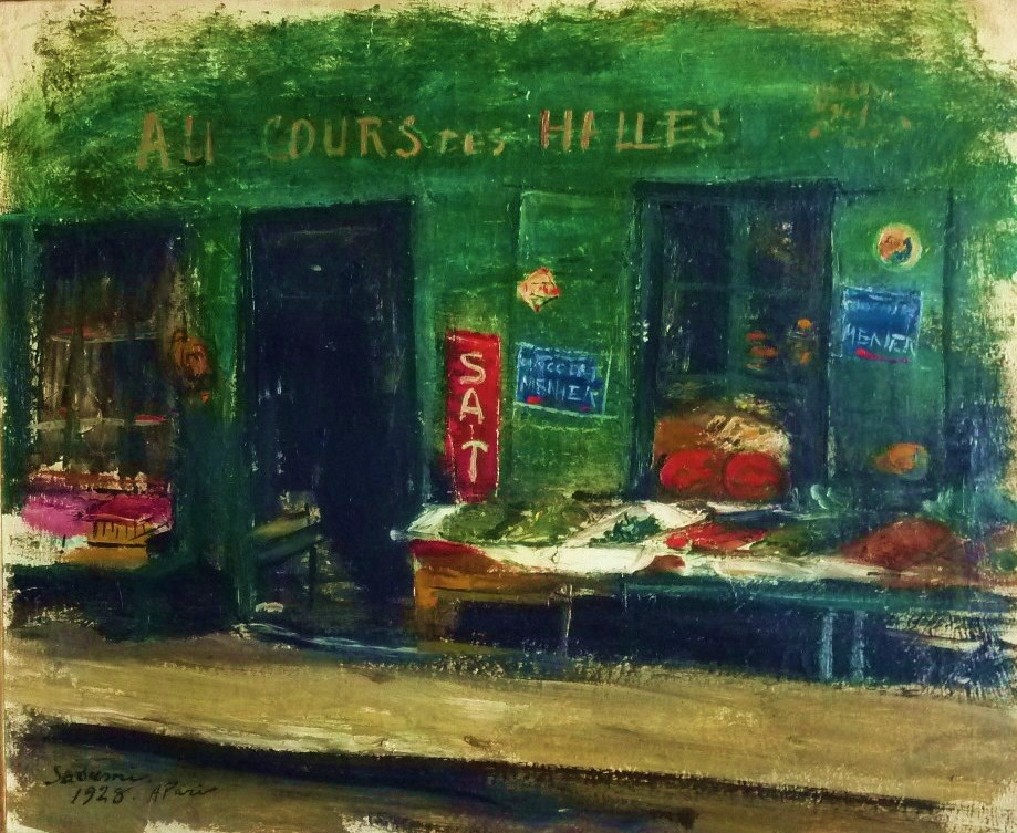 Photographie d'un tableau du peintre japonais Sadami Yokote, mort en 1933 : "Au cours des Halles", réalisée à Paris